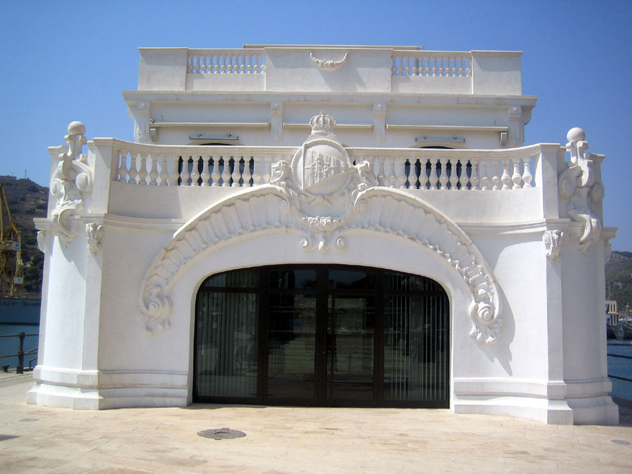 Antiguo Club de Regatas de Cartagena. Obra modernista de Víctor Beltrí.